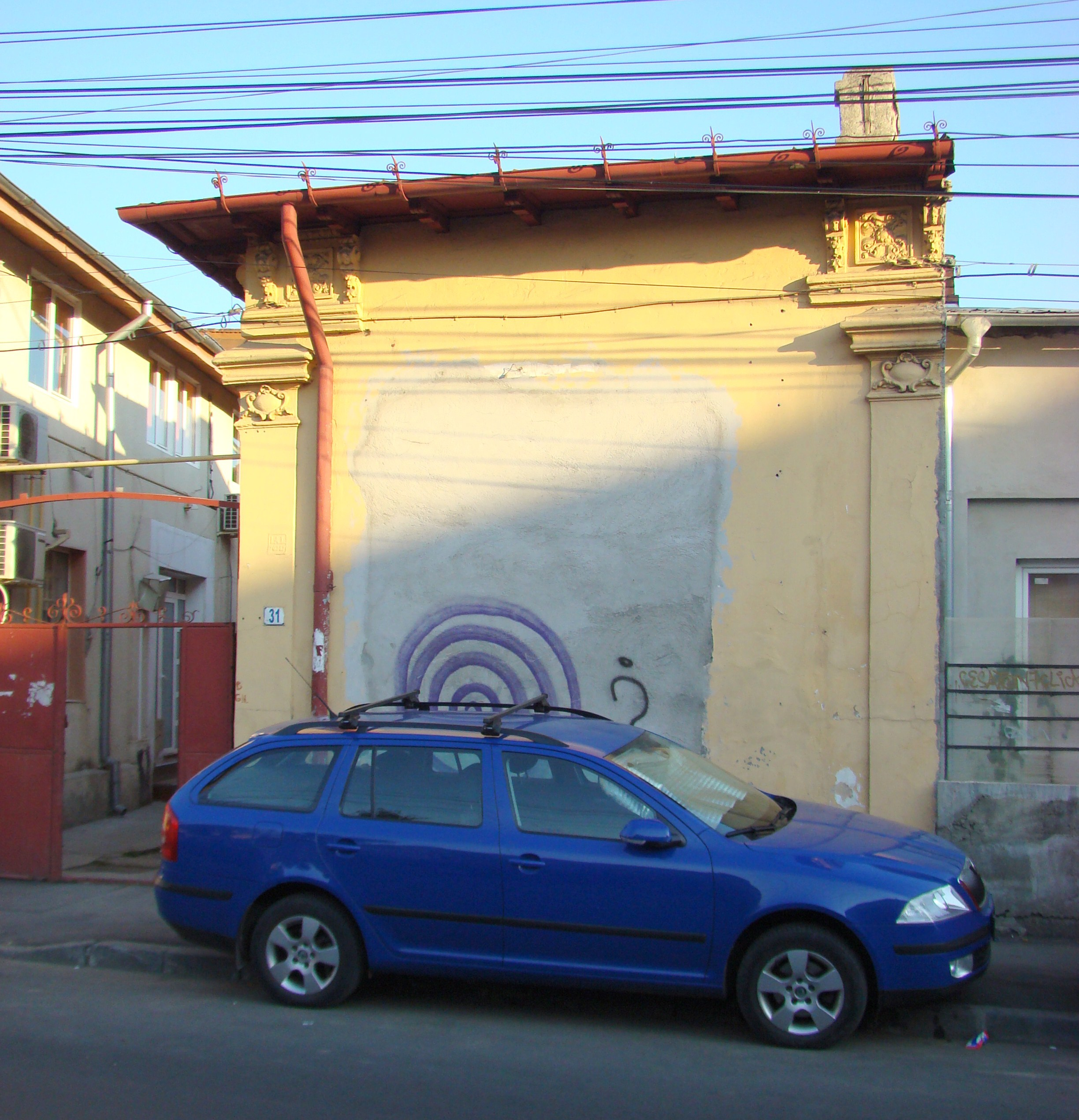 Clădire monument istoric, str. Mircea Vulcănescu, nr.31